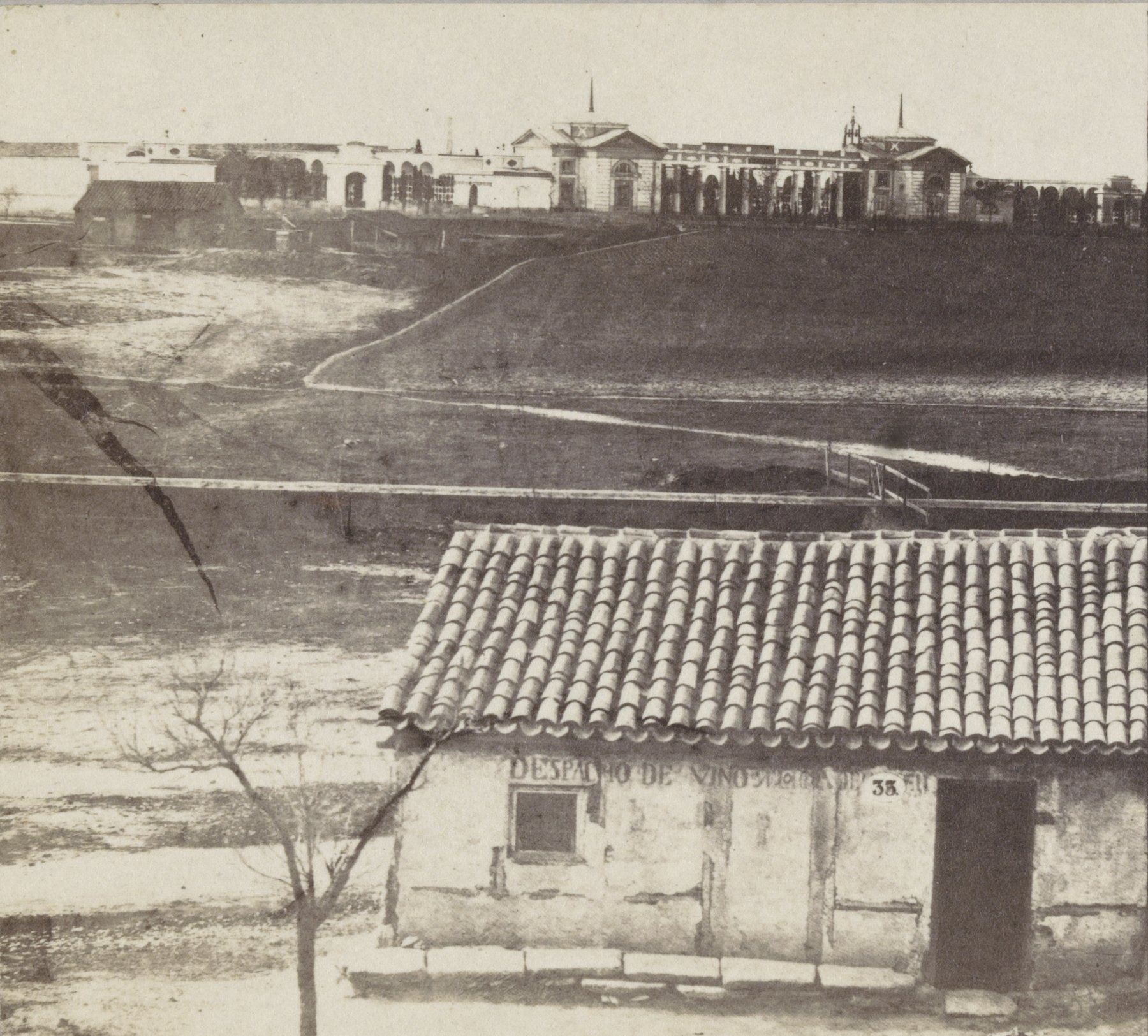 IdentificatieTitel(s): Gezicht op (vermoedelijk) een begraafplaats te MadridObjecttype: stereofoto Objectnummer: RP-F-F07740Opschriften / Merken: nummer, recto, handgeschreven: ‘14’opschrift, verso, handgeschreven: ‘Madrid - Campo Santo’VervaardigingVervaardiger: fotograaf: anoniemPlaats vervaardiging: MadridDatering: ca. 1850 - ca. 1880Fysieke kenmerken: albuminedrukMateriaal: karton fotopapier Techniek: albuminedrukAfmetingen: secundaire drager: h 85 mm × b 170 mmOnderwerpWat: façade (of house or building)churchyard, cemeteryWaar: MadridVerwerving en rechtenVerwerving: overdracht van beheer 1994Copyright: Publiek domein